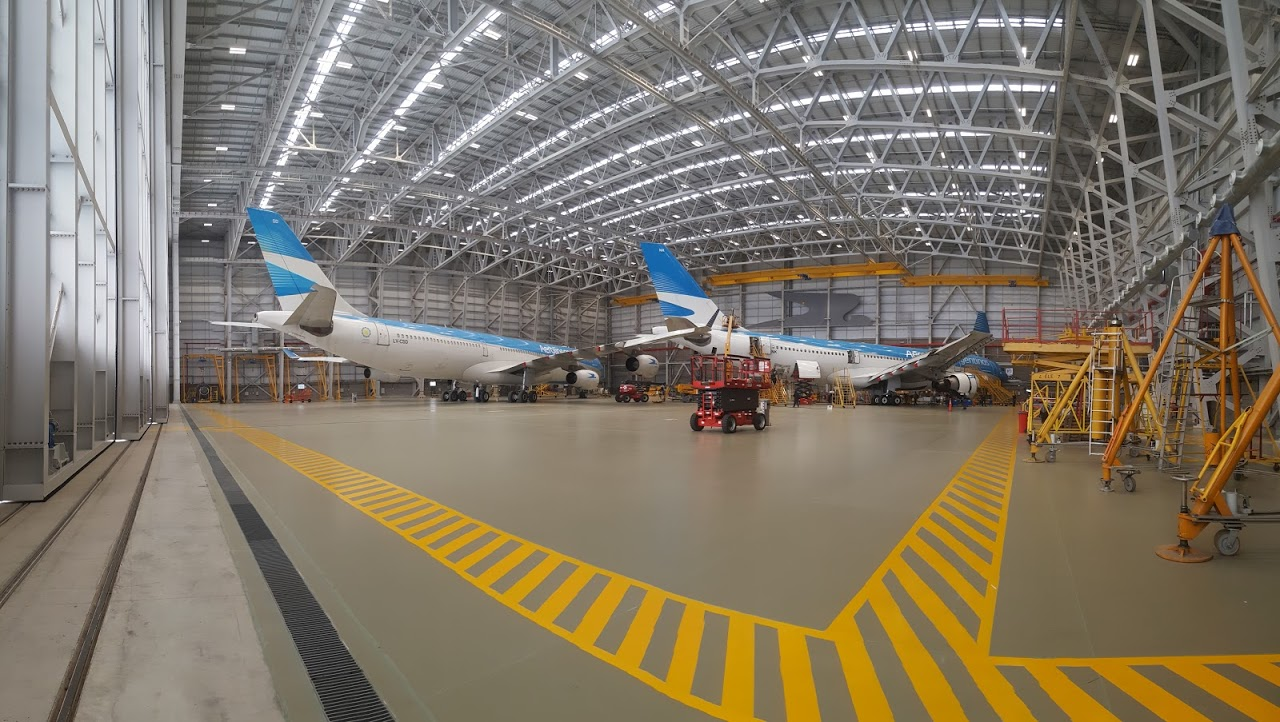 Vista panorámica interna del moderno Hangar 5 de Aerolíneas Argentinas en Planta Industrial Ezeiza.